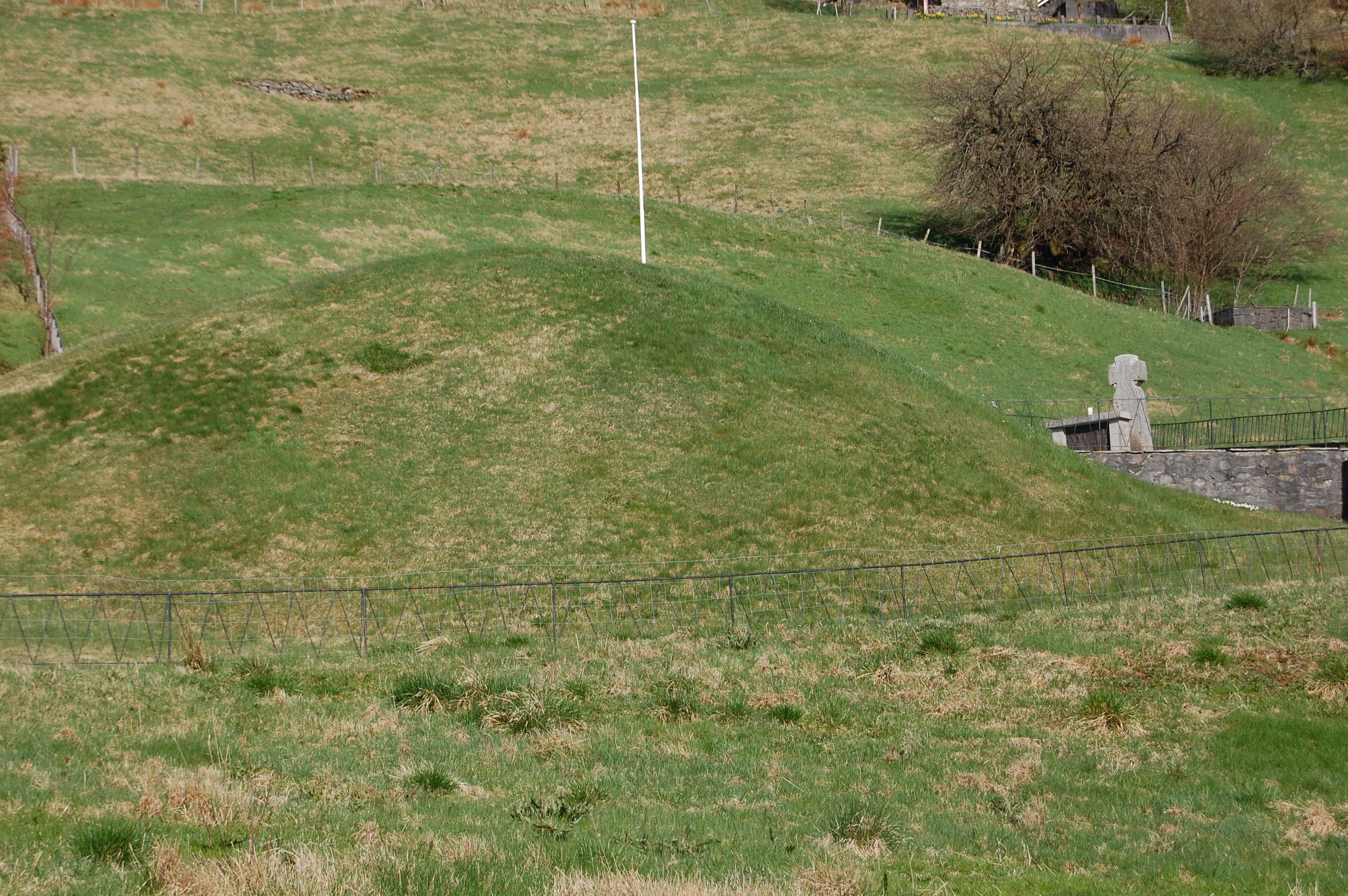 Håkonshaugen, også kalt Kongshøyen på Seim. Minnesmerket over Håkon den Gode.